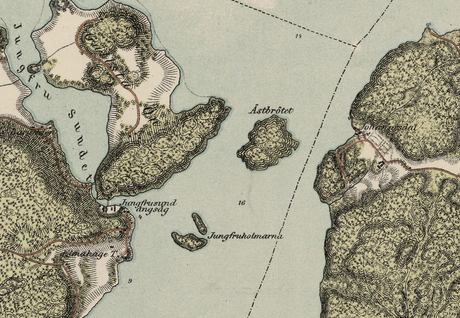 Trakten omkring Stockholm i nio blad med ön Ästbröte (Estbröte)